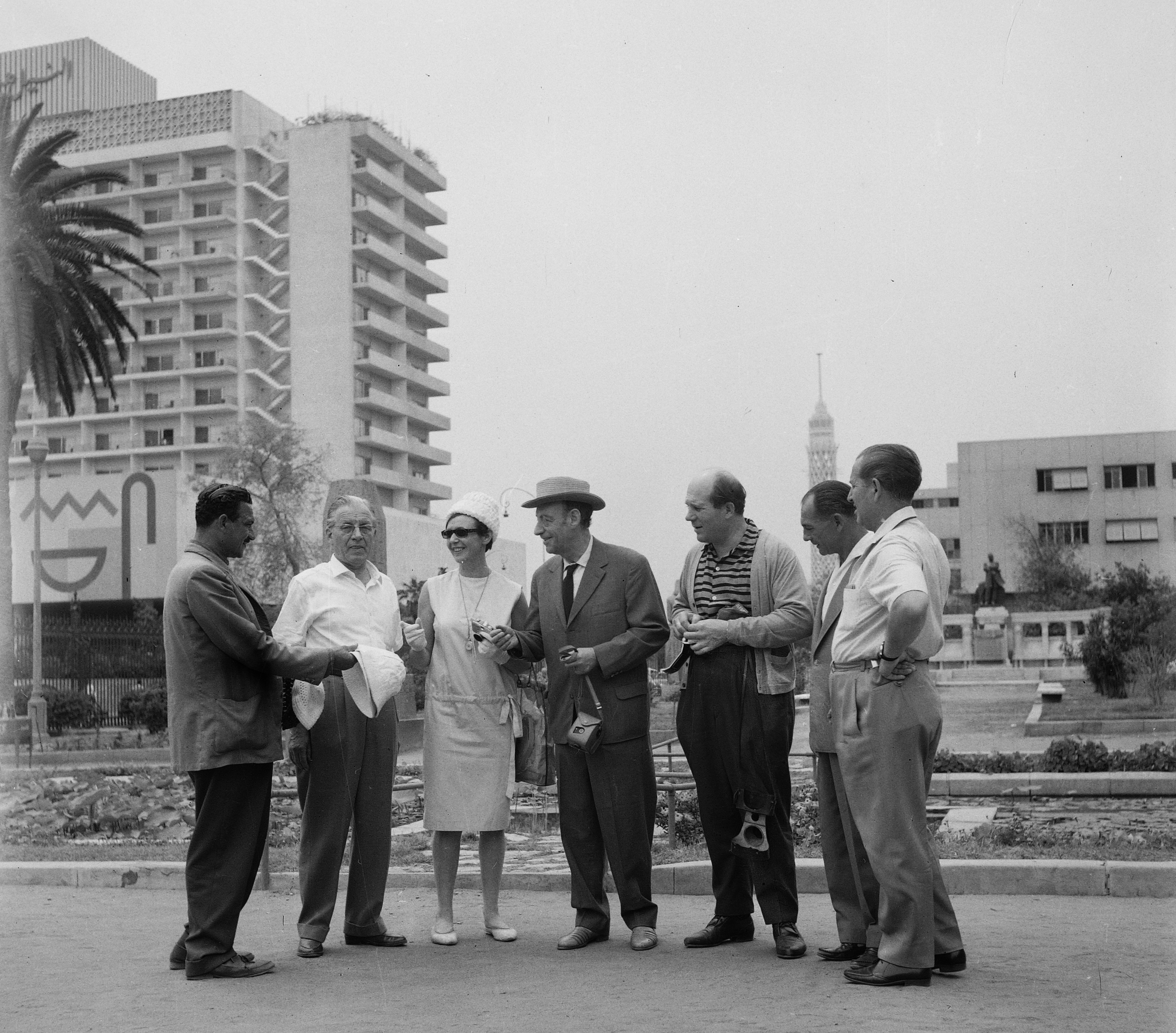 az Egyiptomi Régiségek Múzeumának parkja, középen Psota Irén, Latabár Kálmán és Pécsi Sándor színművészek. A felvétel az Egyiptomi történet című film forgatása alkalmával készült. Háttérben jobbra Auguste Mariette francia régész, egyiptológus szobra, távolban a Kairó-torony. Location: Egypt, Cairo Tags: tableau, celebrity, camera Title: az Egyiptomi Régiségek Múzeumának parkja, középen Psota Irén, Latabár Kálmán és Pécsi Sándor színművészek. A felvétel az Egyiptomi történet című film forgatása alkalmával készült. Háttérben jobbra Auguste Mariette francia régész, egyiptológus szobra, távolban a Kairó-torony.